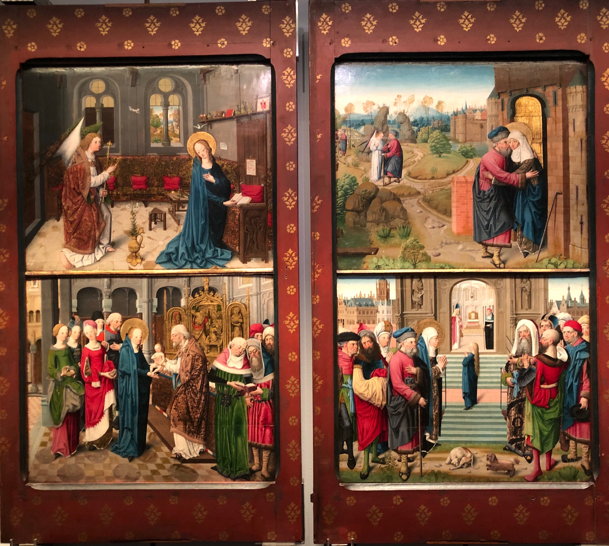 Rechter Flügel des Marienaltars im Aachener Domschatzes